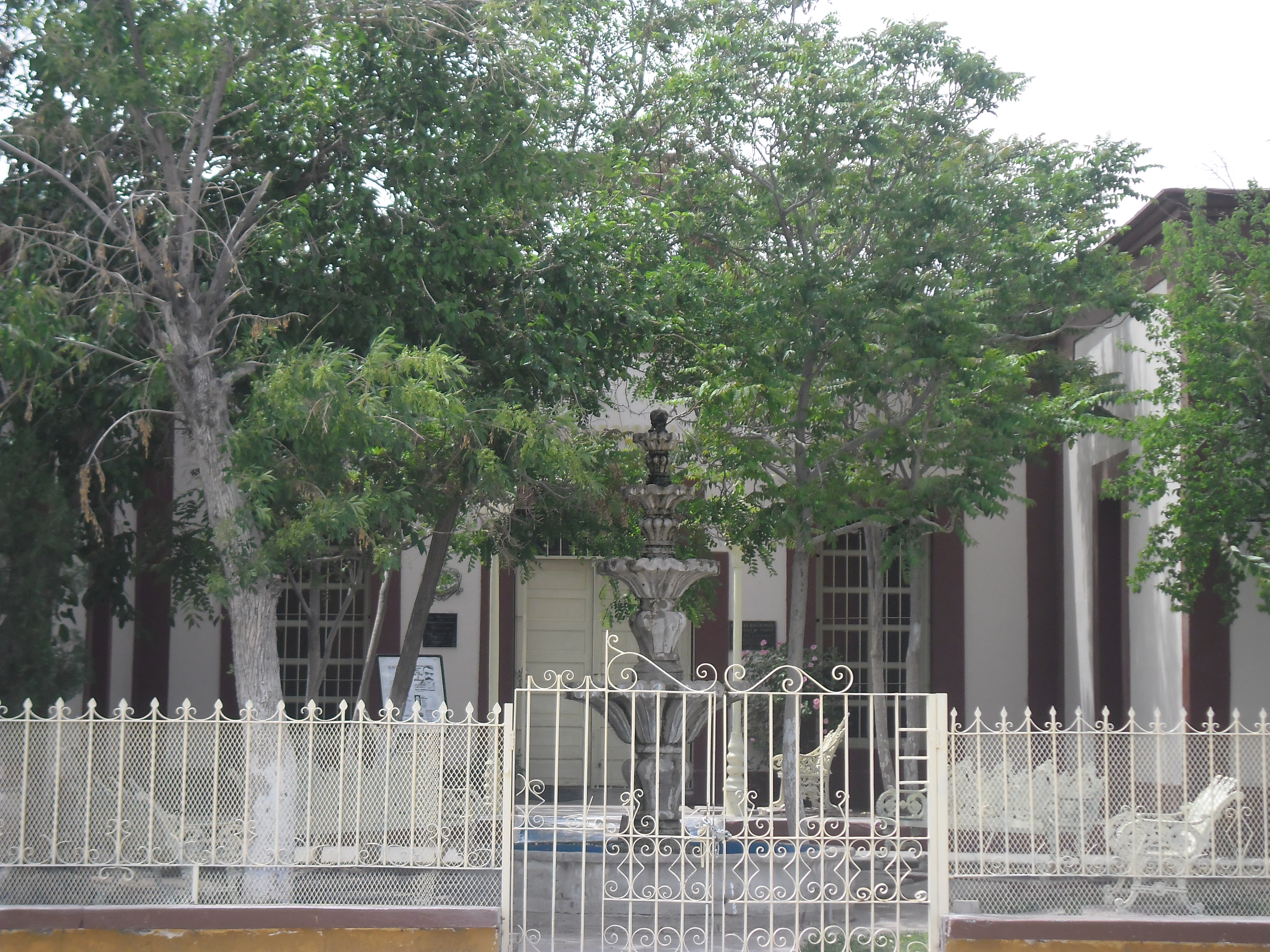 museo de san agustin